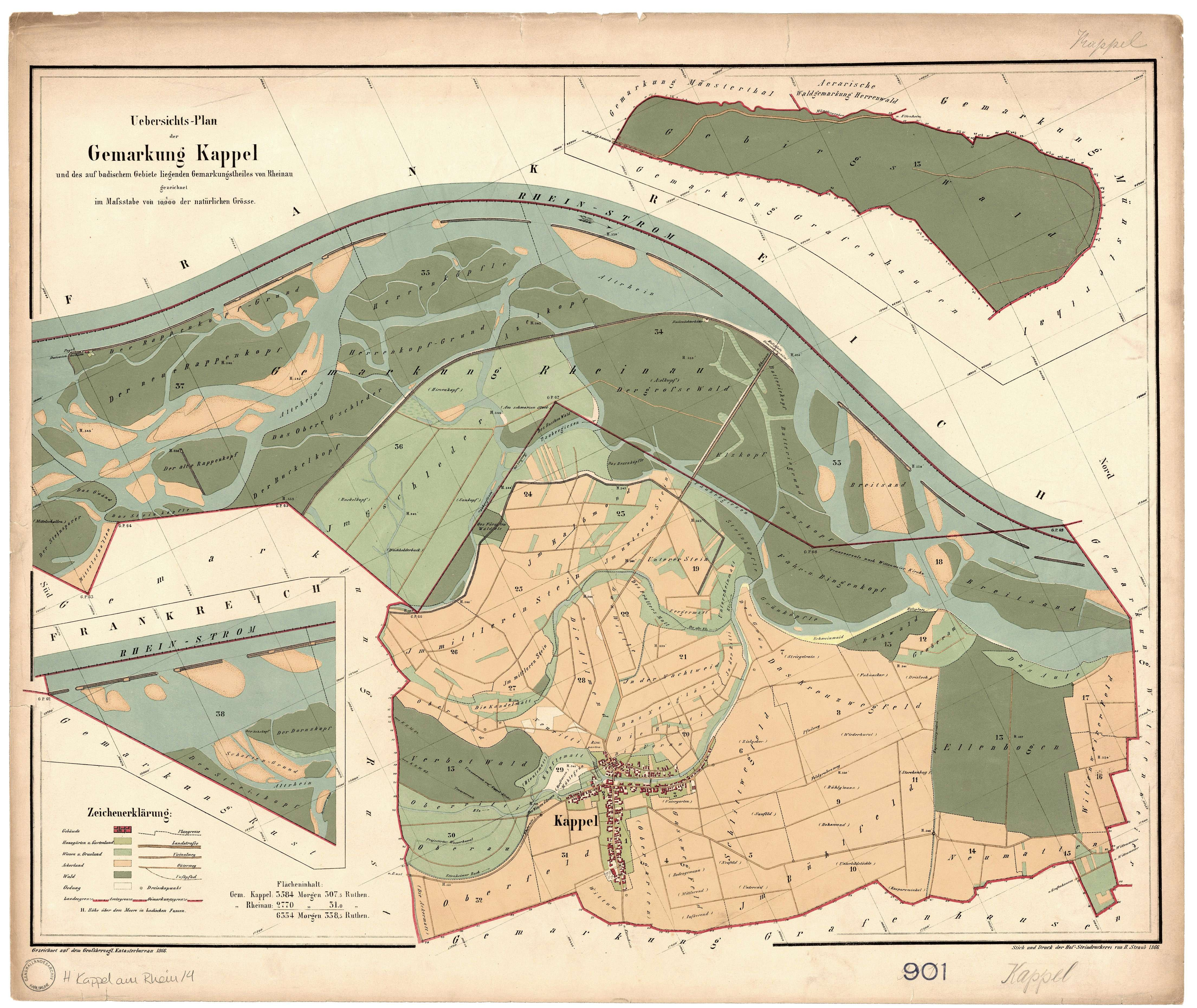 Übersichtsplan der Gemarkung Kappel (heute Kappel-Grafenhausen) und des badischen Teils der Gemarkung Rheinau (heute Gemeindefreies Gebiet Rheinau) von 1866